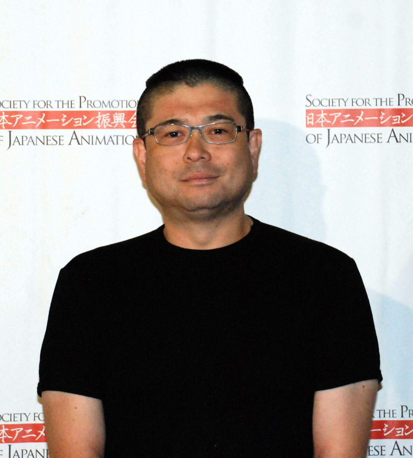 Tatsuo Sato